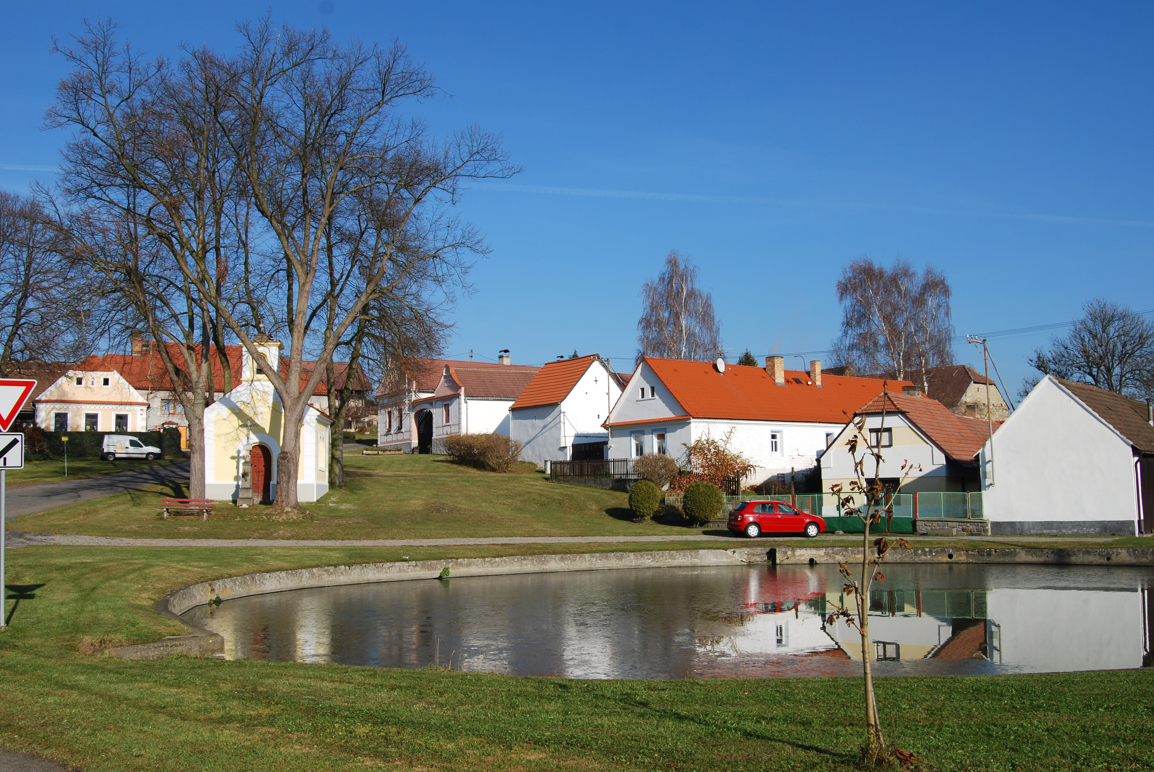 Pohled na náves. Tukleky. Součást obce Oslov. Okres Písek. Česko.